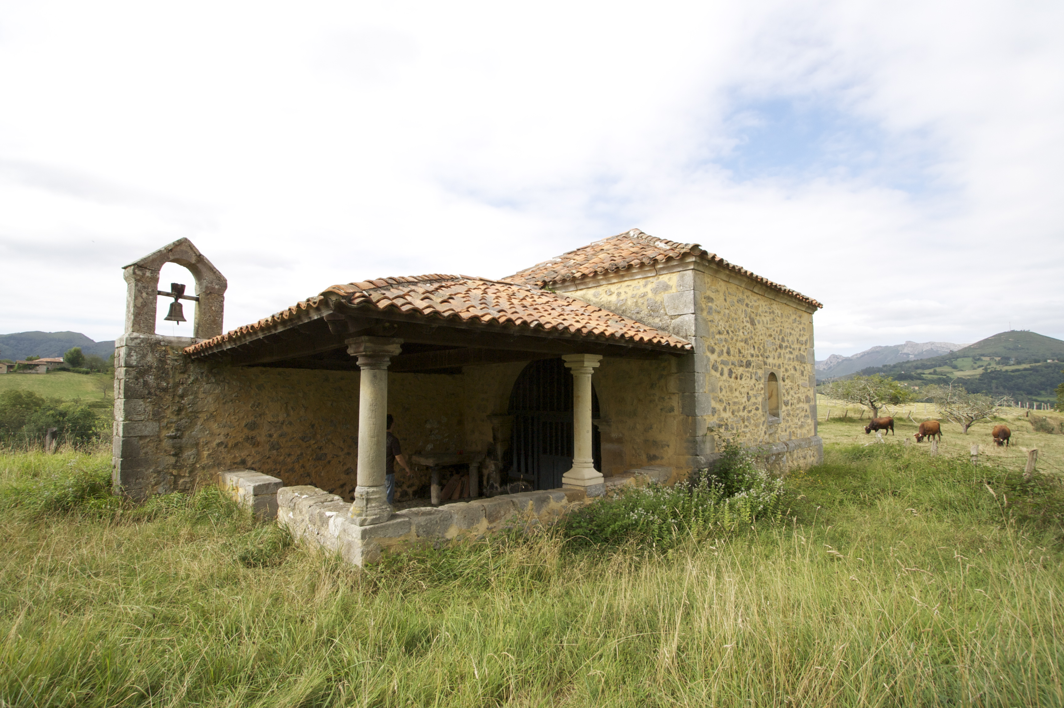 Capilla de Santo Meder, Isongo, Cangas de Onís, Asturias.